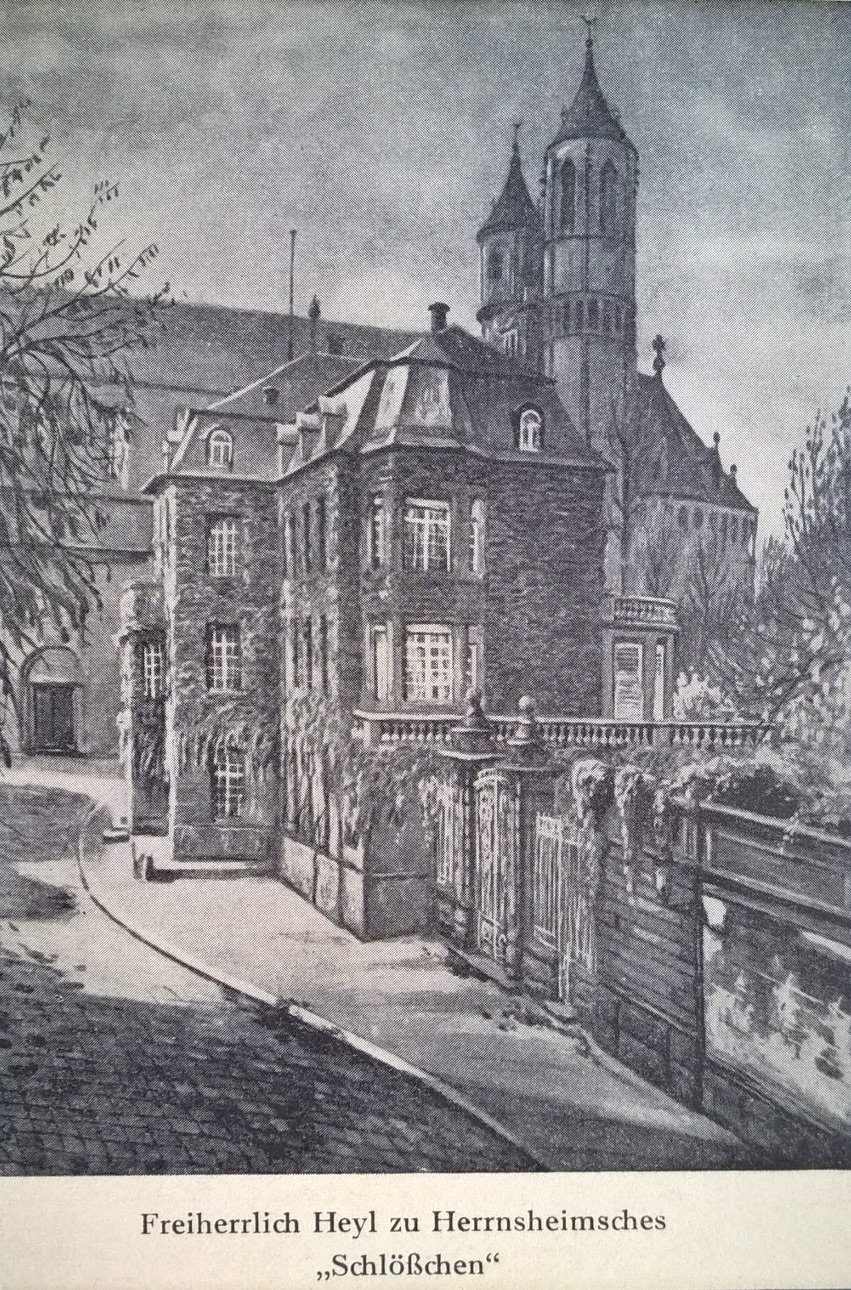 Schlösschen Worms nach Umbau durch Architekt Bruno Paul im Jahr 1905.